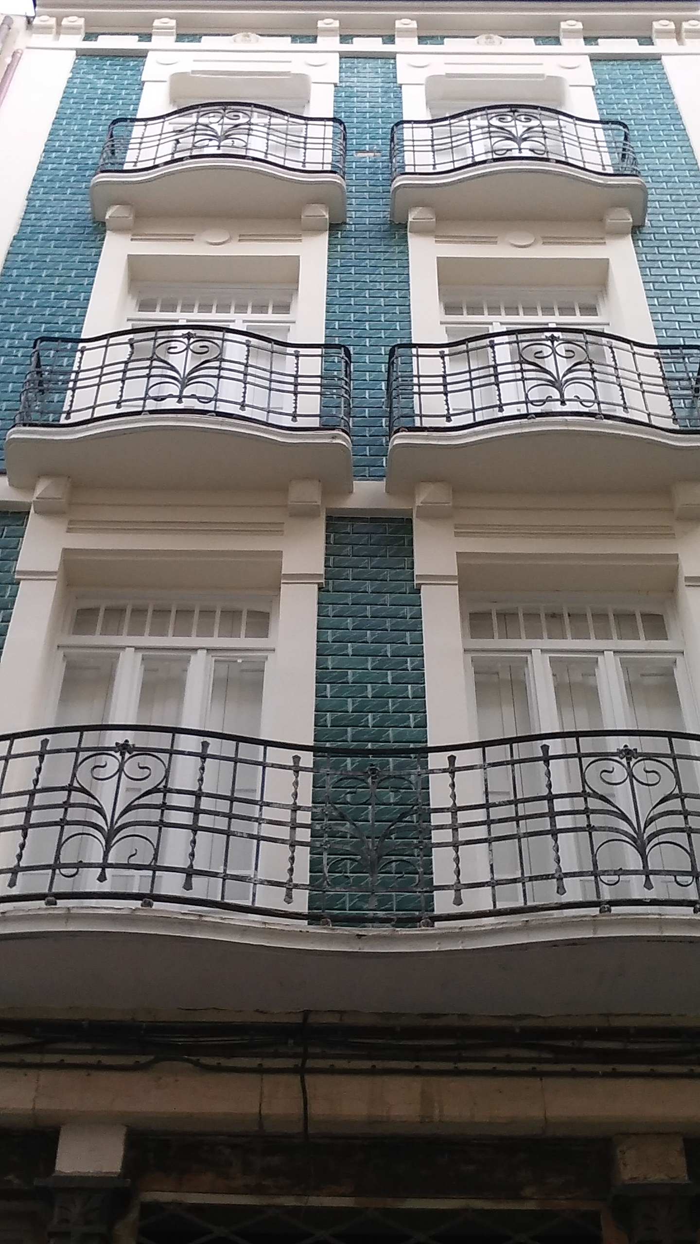 Edifici moderniste en carrer Pintor Casanova número 18 d'Alcoy (Alacant). Obra de Timoteu Briet Montaud. Any 1915.